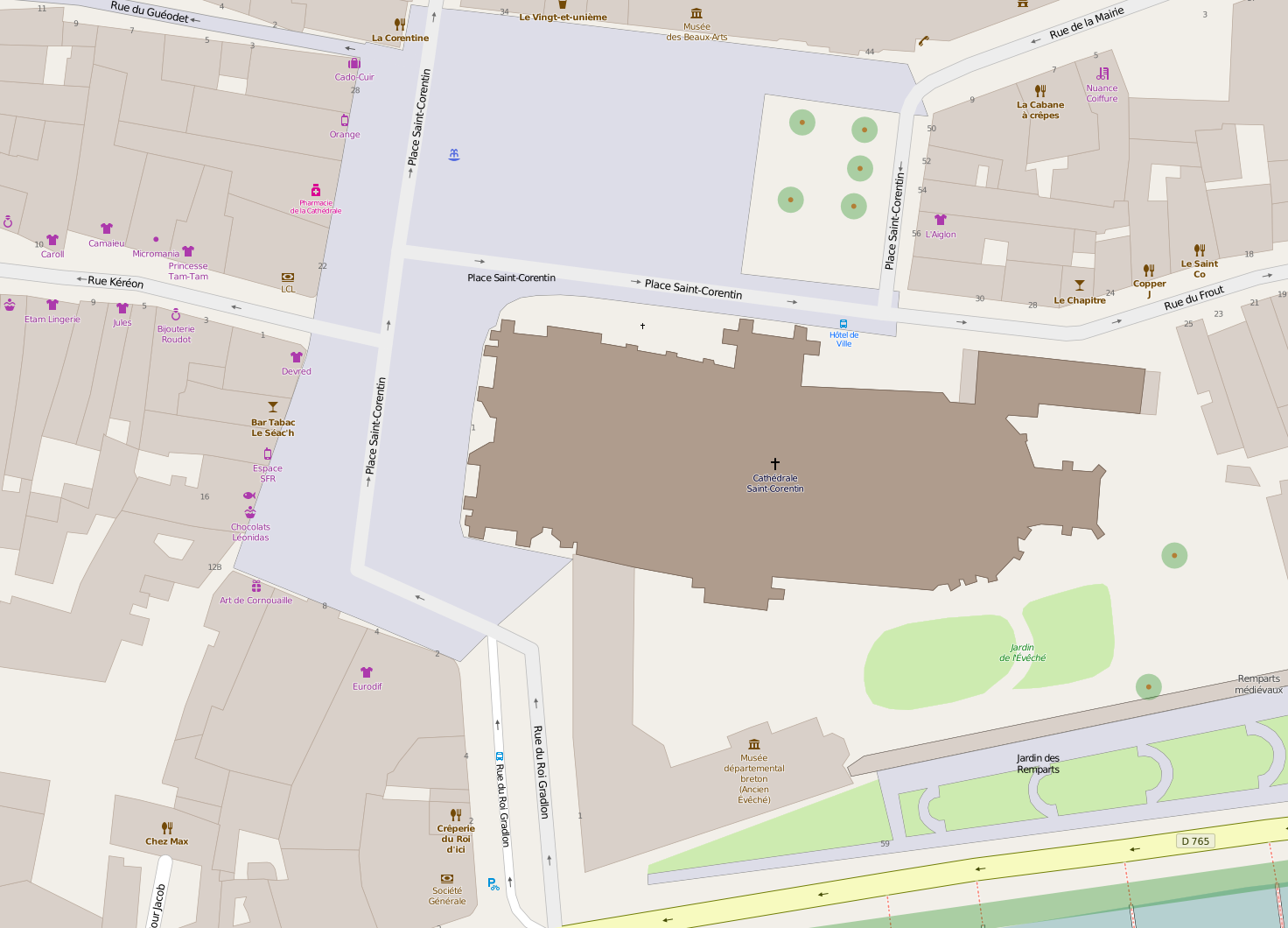 Plan de la cathédrale Saint-Corentin de Quimper